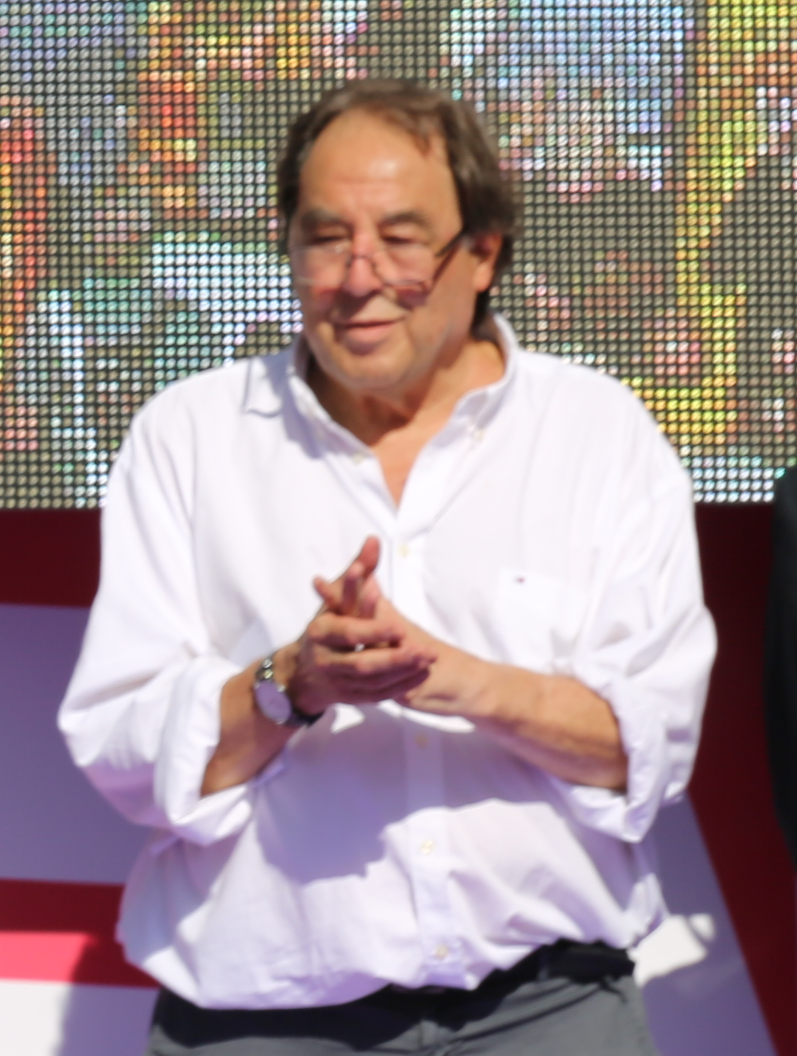 08.10.2017 Manifestació "Prou! Recuperem el seny" - Barcelona